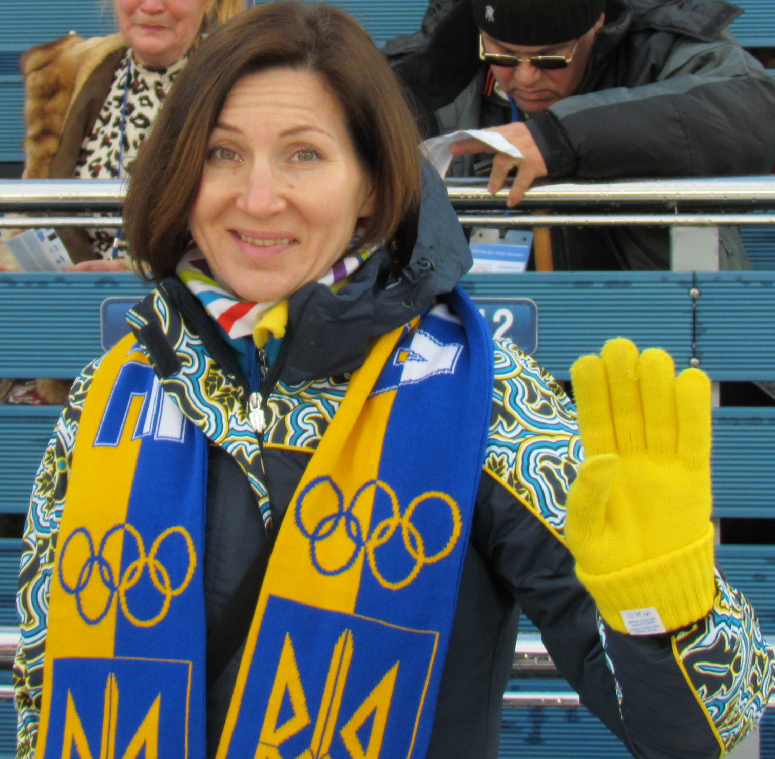 Срібна призерка зимових Олімпійських ігор 1998 Олена Петрова (Україна)